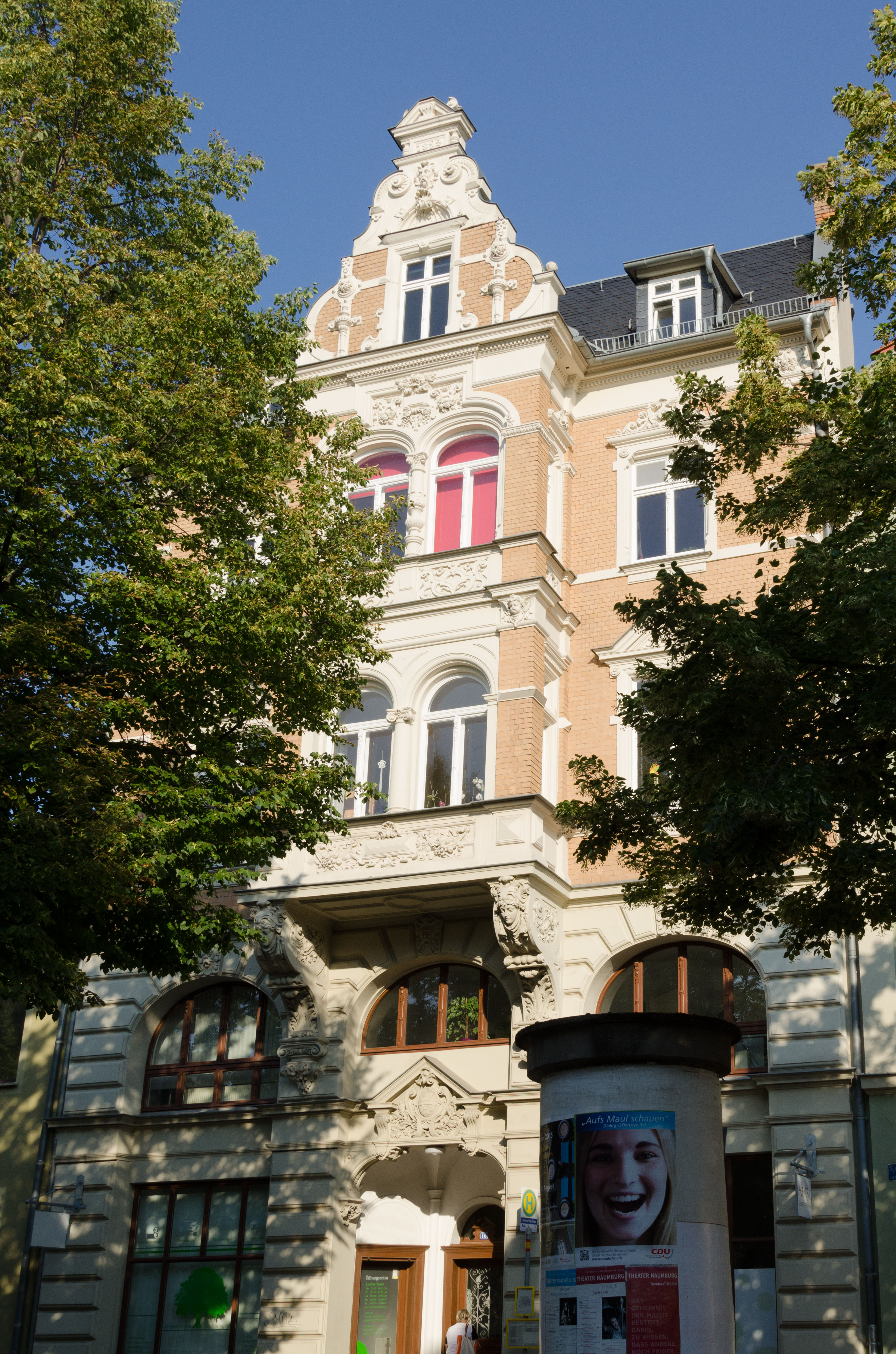 Naumburg, Lindenring 16